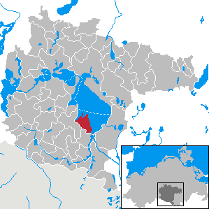 Ludorf im Landkreis Müritz, Mecklenburg-Vorpommern